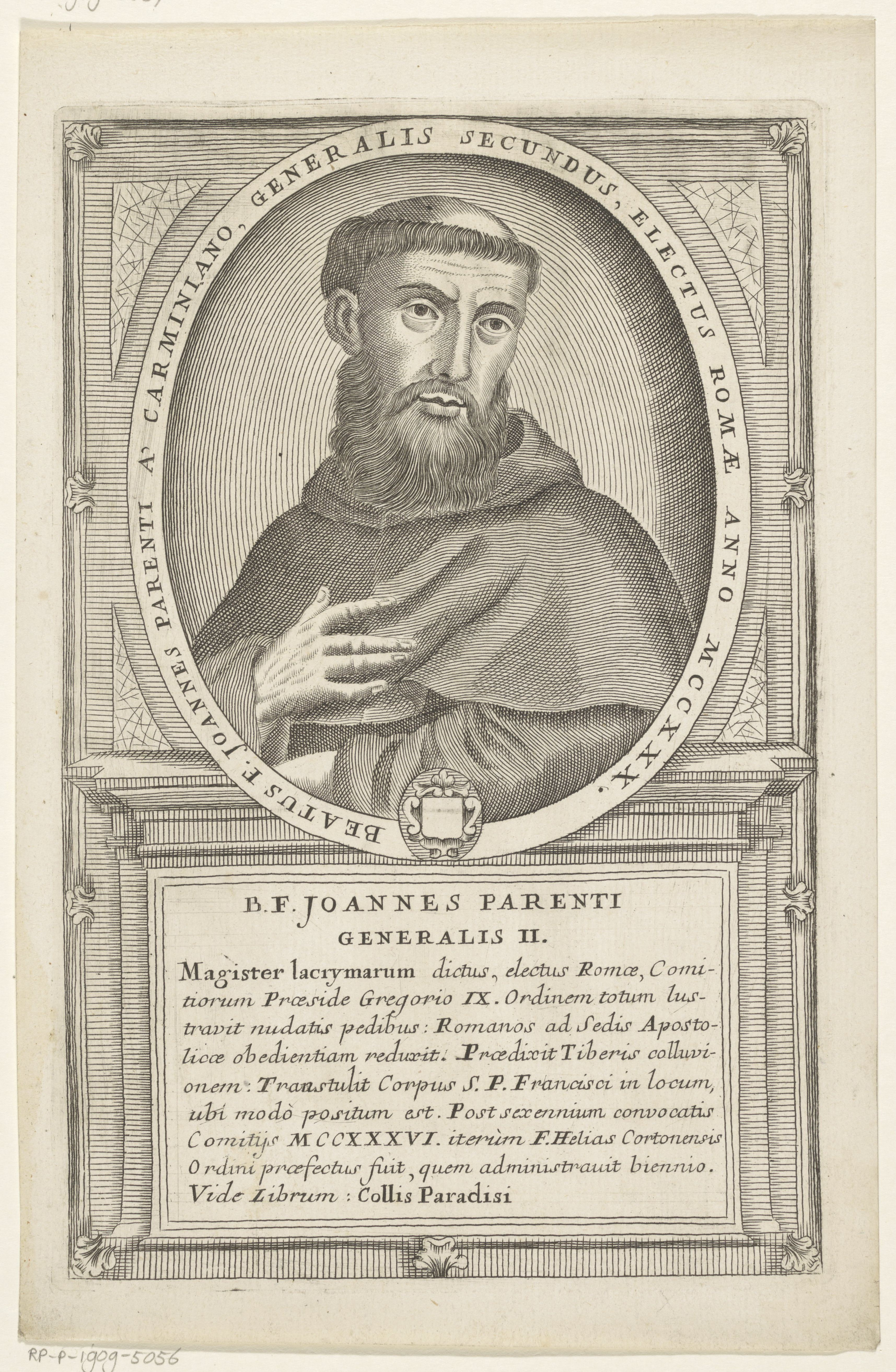 IdentificatieTitel(s): Portret van Giovanni Parenti, 1ste Minister Generaal van de franciscaner ordePortretten van Ministers Generaal van de franciscaner orde (serietitel)Objecttype: prent Objectnummer: RP-P-1909-5056Opschriften / Merken: verzamelaarsmerk, verso, gestempeld: Lugt 2228VervaardigingVervaardiger: prentmaker: Antonio Luciani (toegeschreven aan)Plaats vervaardiging: ItaliëDatering: 1710 - 1738Fysieke kenmerken: gravureMateriaal: papier Techniek: graveren (drukprocedé)Afmetingen: plaatrand: h 247 mm × b 160 mmToelichtingDeze prent maakt deel uit van een groep van 60 portretten.OnderwerpWat: historical personsWie: Giovanni ParentiVerwerving en rechtenVerwerving: aankoop 1905Copyright: Publiek domein